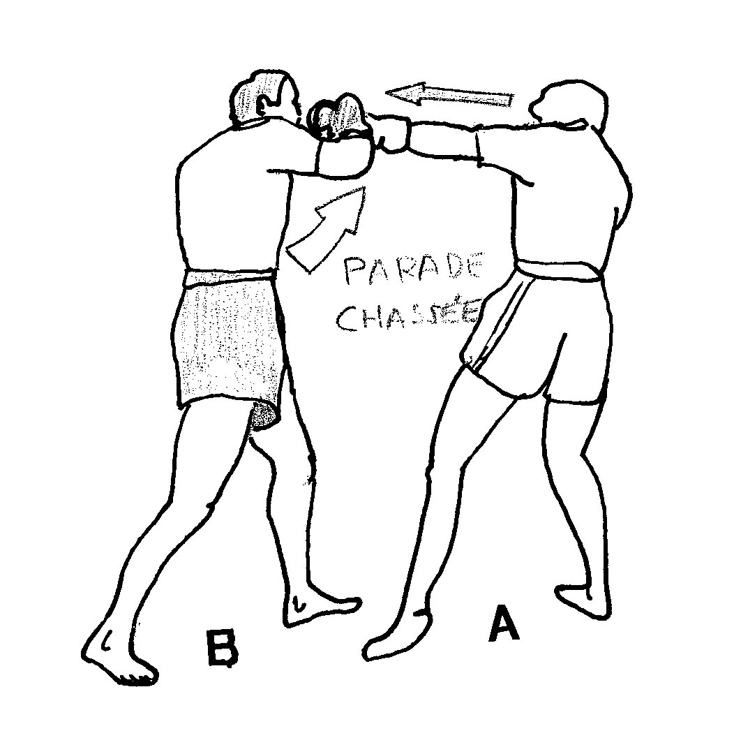 devie2.jpg